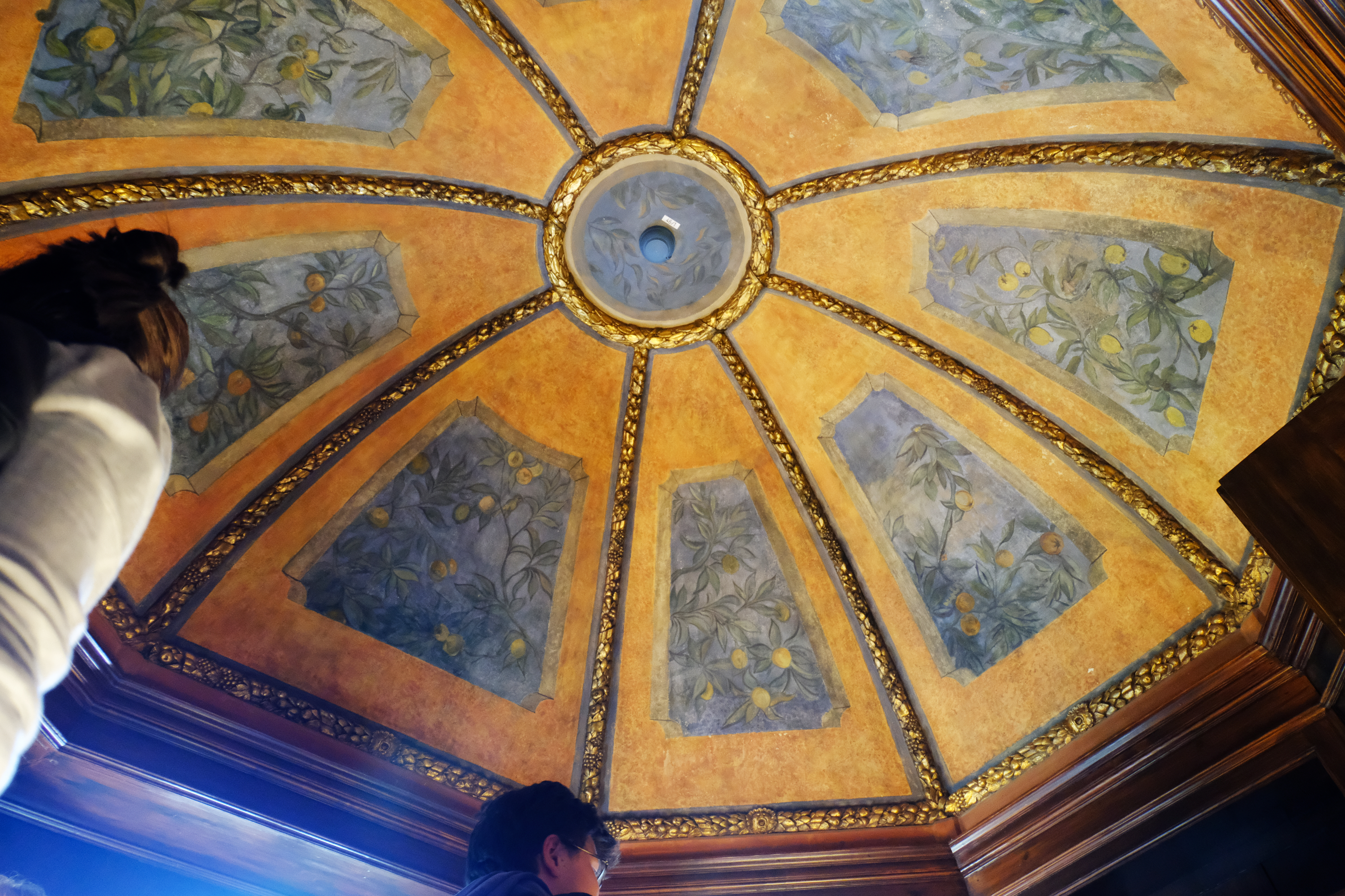 Das Turmzimmer in der Monacensia im Hildebrandhaus, München (2019)